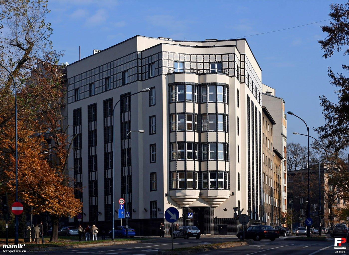 Kamienica profesorska, po prawej ulica Łobzowska